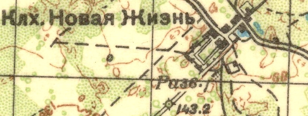 Топографическая карта Ленинградской области, квадрат О-35-23-В (Хотыницы), деревня Муромицы